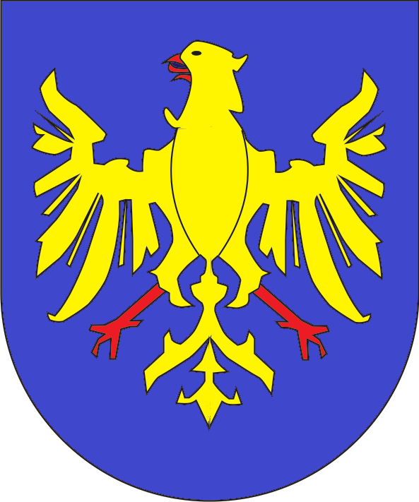 coats of arms of the palatinate of Saxonia